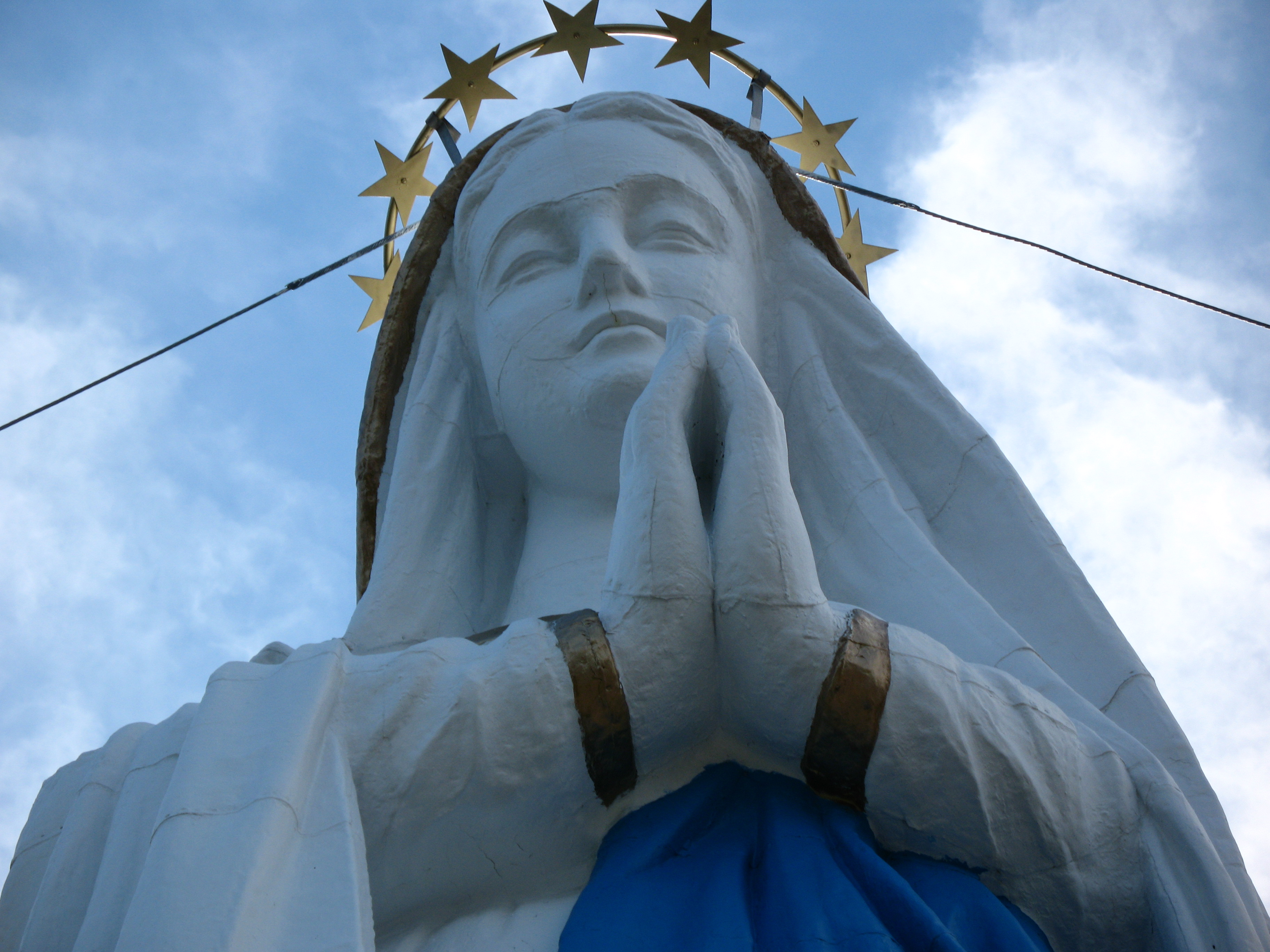 Statue Notre-Dame-du-Saguenay Parc national du Saguenay Cap Trinité